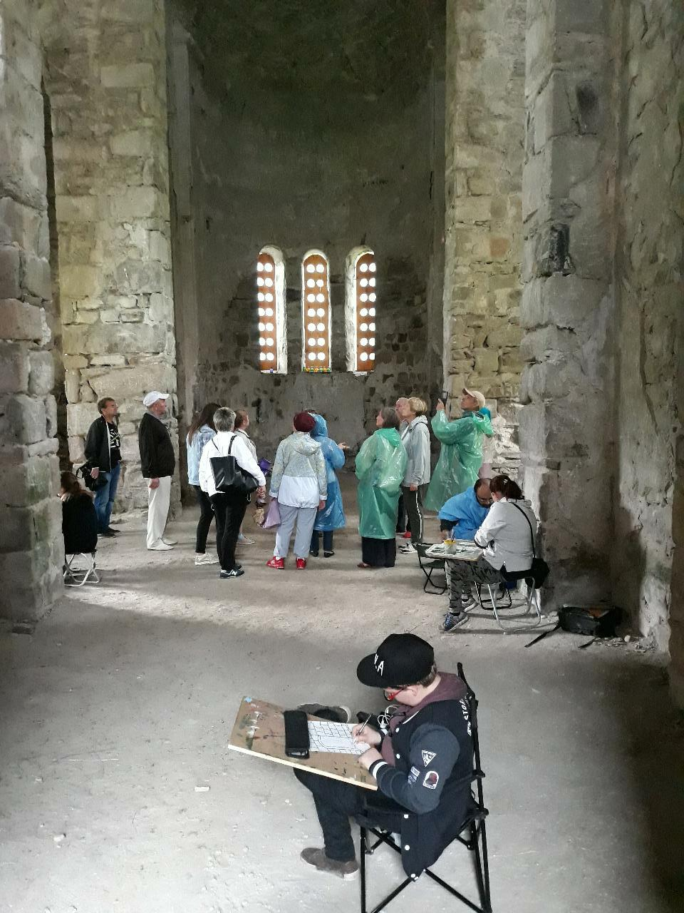 Экскурсия в Нижний Архыз, 29.06.2019